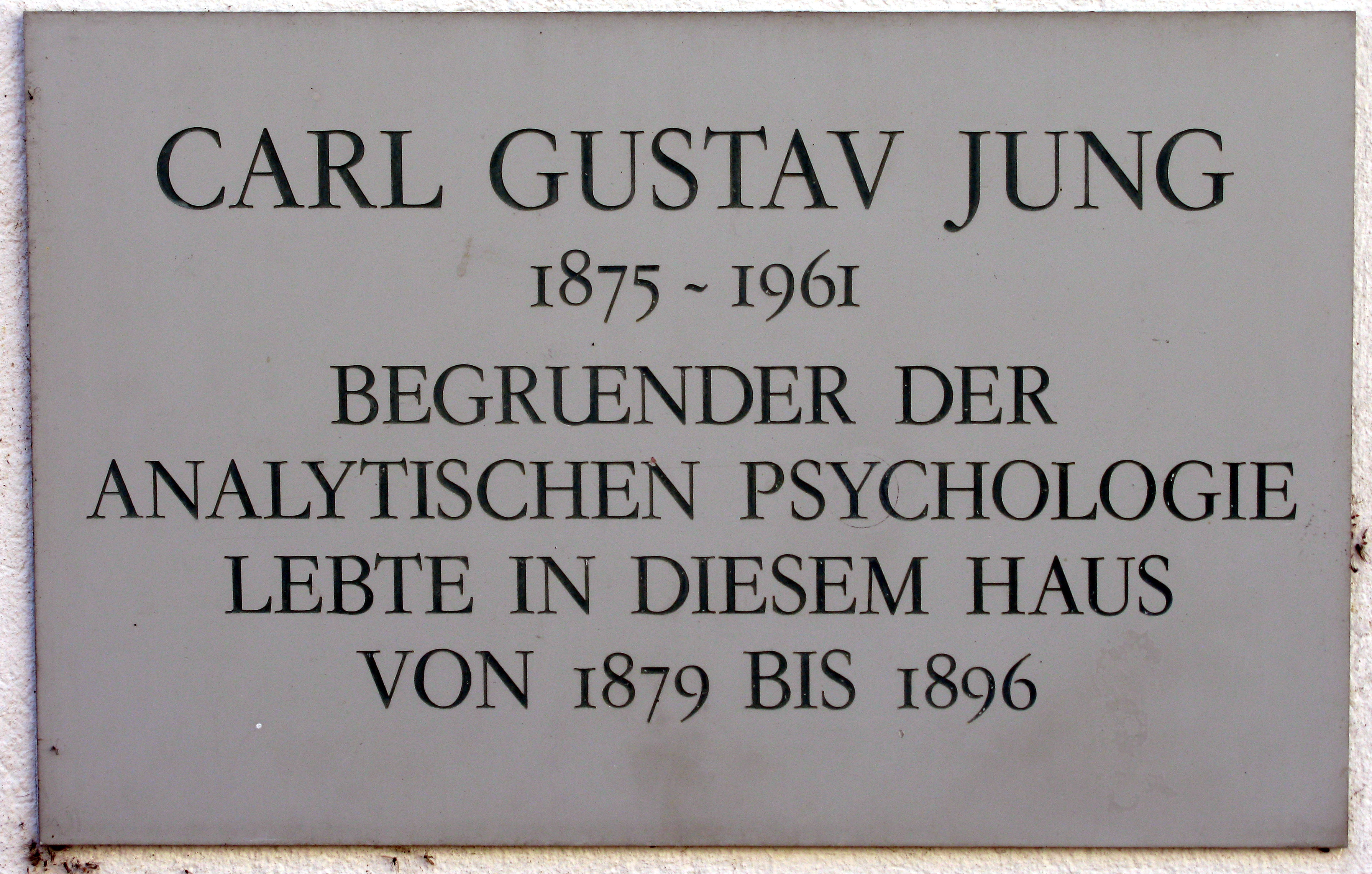 Wohnhaus von Carl Gustav Jung in Basel-Kleinhüningen, Tafel